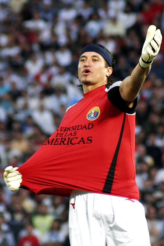 Nicolás Peric, durante la final del Torneo de Clausura 2006 del fútbol chileno, entre Colo-Colo y Audax Italiano